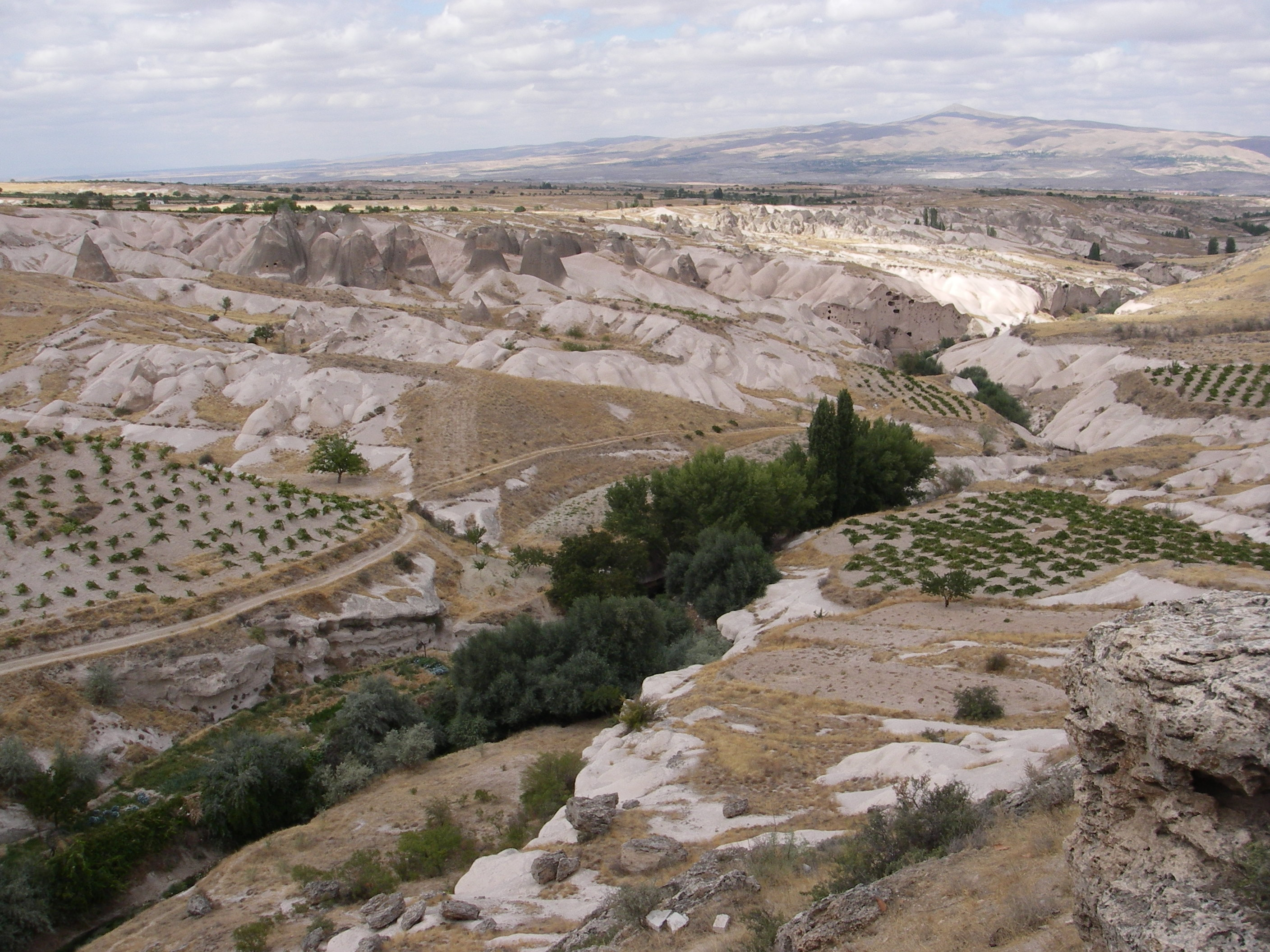 Çat Valley, Nevşehir, Cappadocia, Turkey